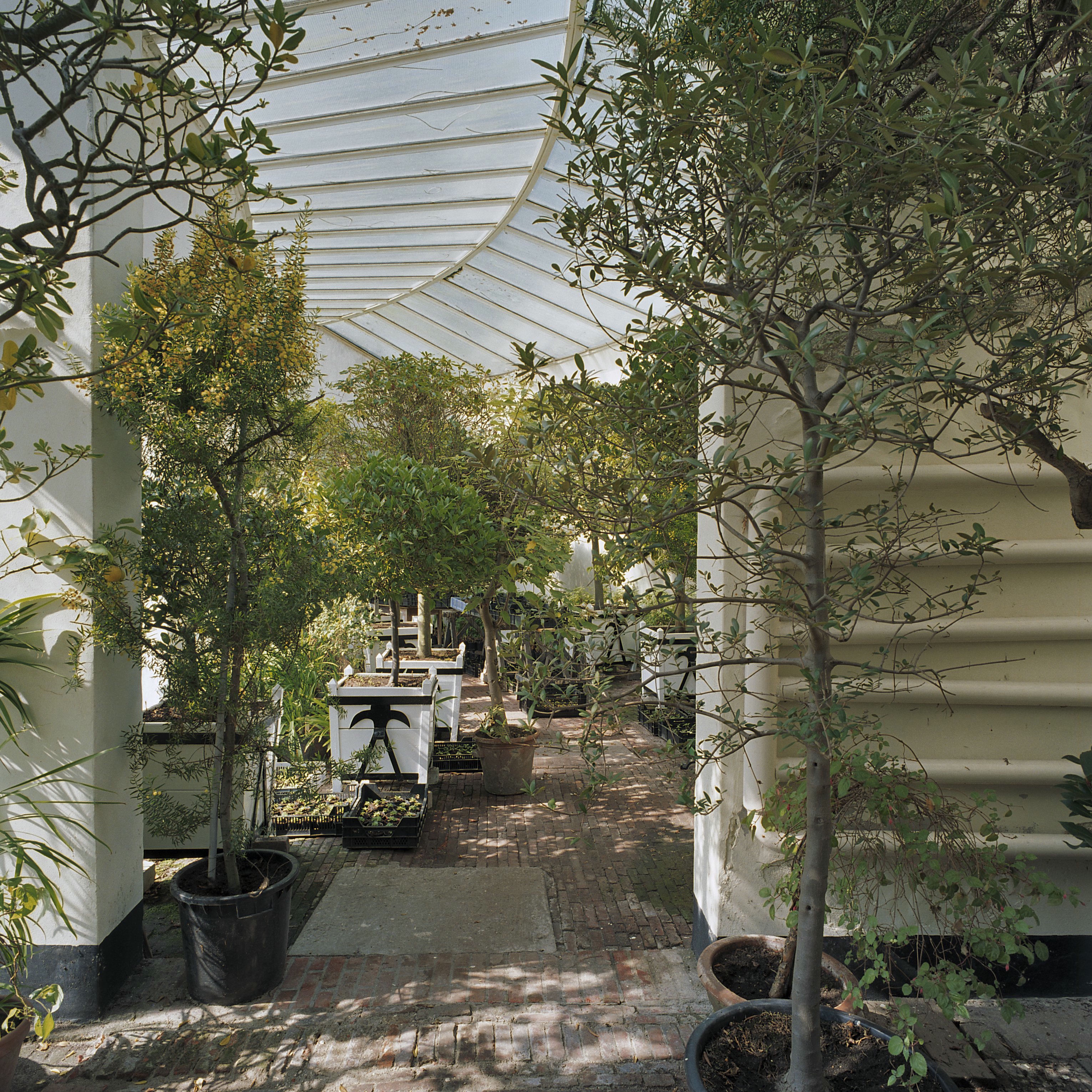 Mattemburgh: Interieur met kuipplanten en c.v.